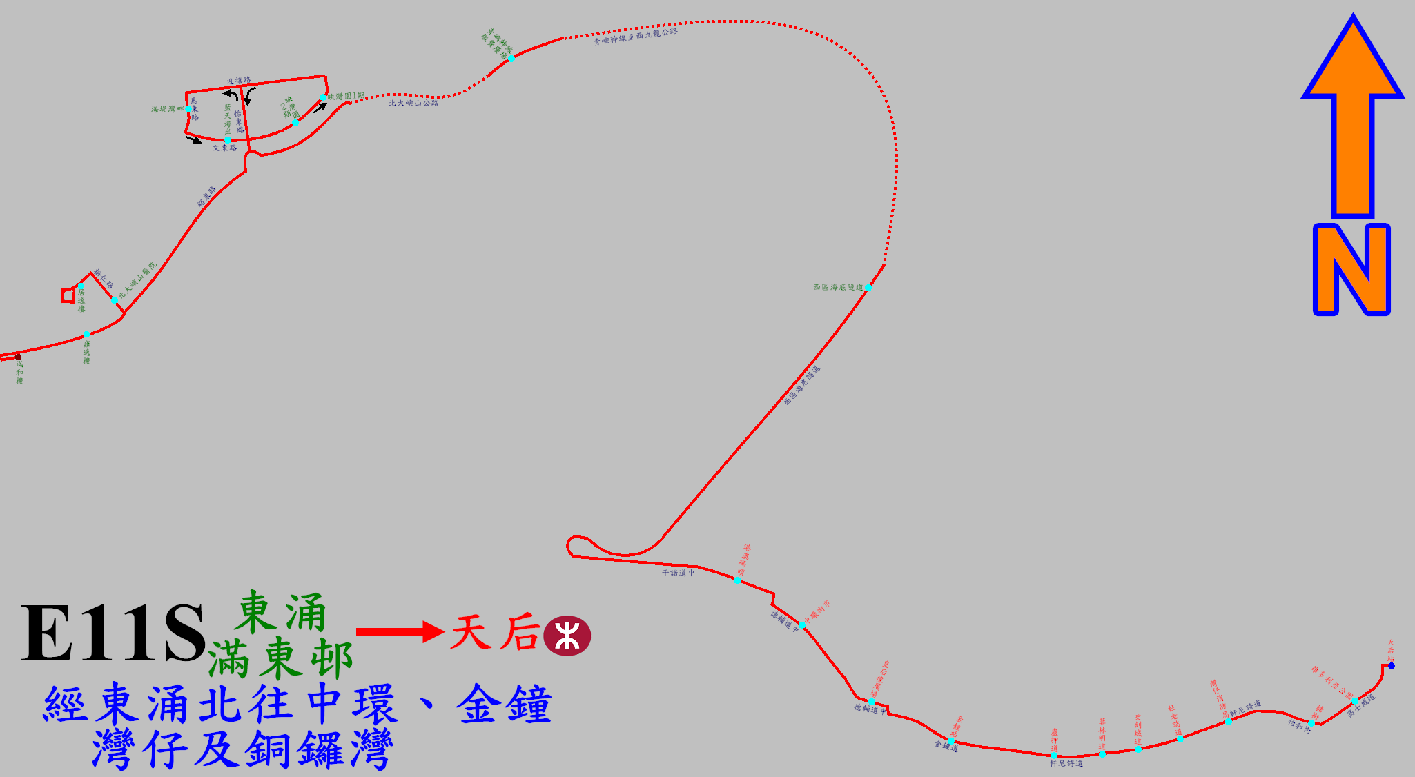 中文（香港）: 城巴E11S線的走線圖